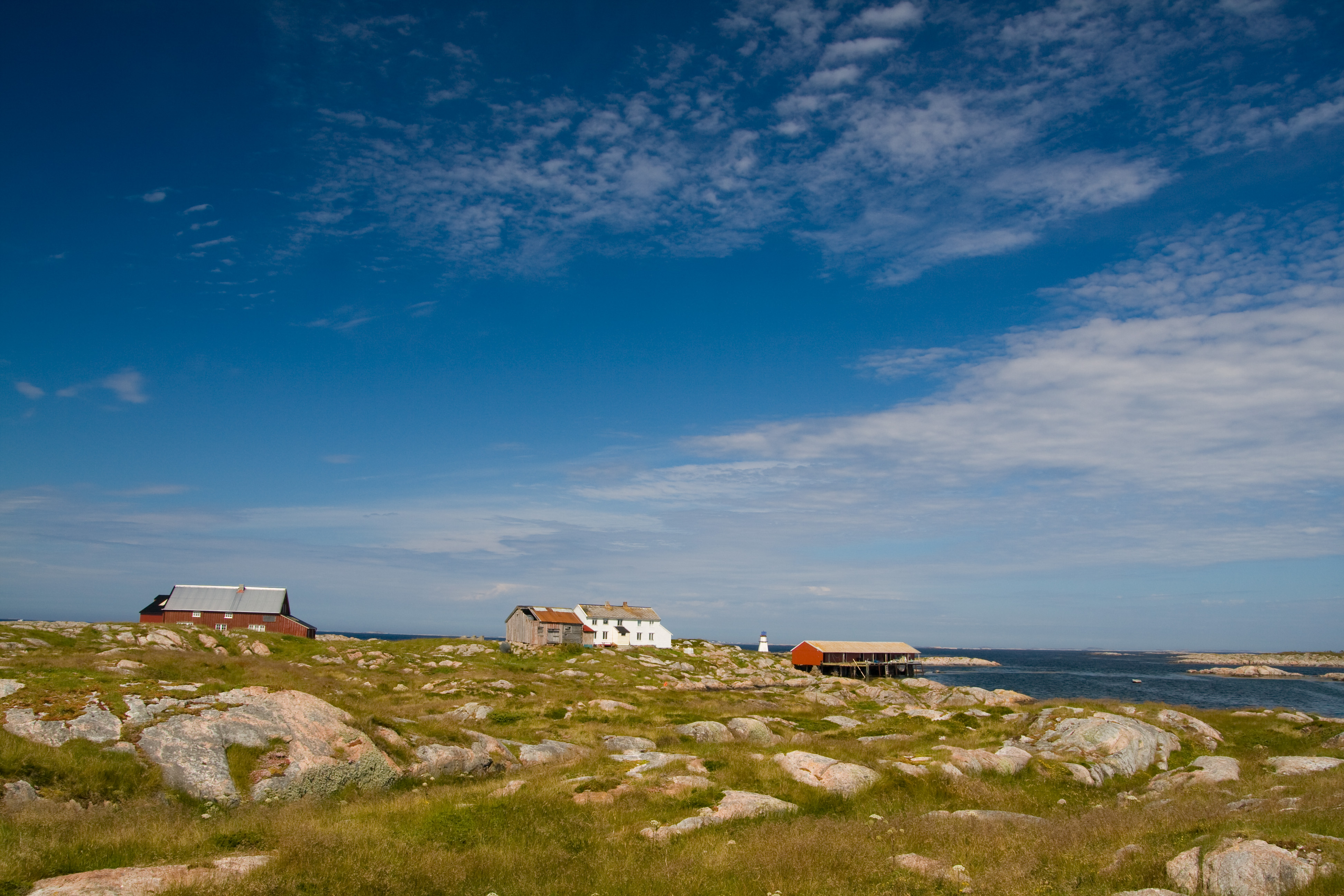 Humlingsvær